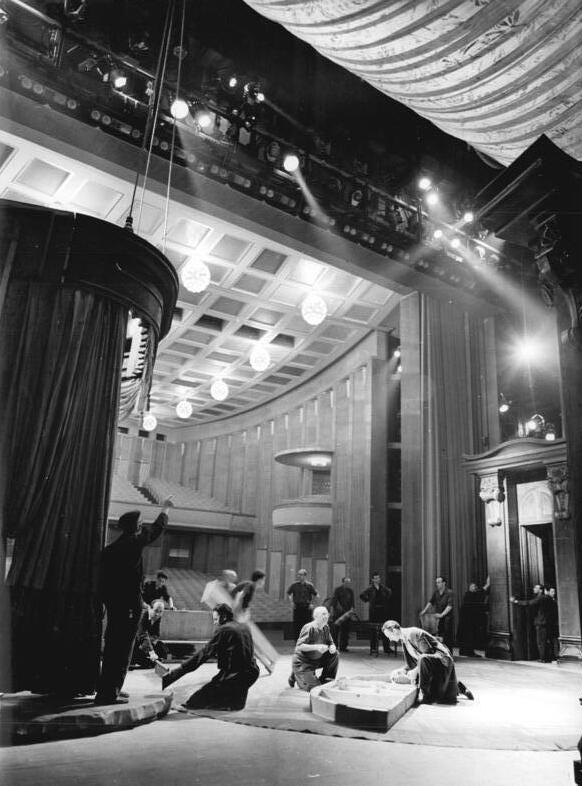 Leipzig, Opernhaus, Hauptbühne Zentralbild Kohls-Leske Hein-Gi 13.1.1961 Neue Leipziger Oper - Eines der modernsten Bühnenhäuser Europas Eines der modernsten Bühnenhäuser Europas ist die neue Leipziger Oper, die am 8. Oktober ihre erste Premiere mit Ludwig van Beethovens "Fidelio" erlebte. Etwa 8400 Bauarbeiter und Werktätige schufen die neue Oper, in der jedem der 1700 Zuschauer beste Sicht- und Hörverhältnisse geboten werden. Hervorzuheben ist die ausgezeichnete Akustik. Das Opernhaus hat die günstige Nachhallzeit von 1,6 Sekunden bei ausgeglichener Nachhallkurve und sehr guter Sprachverständlichkeit. Die Spielbühne des neuen Hauses is mit 900² die größte der Deutschen Demokratischen Republik. Die eingebaute Drehbühne, die 18 Meter im Durchmesser mißt, ist kombiniert mit einer hinteren und zwei seitlichen Schiebebühnen, die eine schnelle Verwandlung des Bühnenbildes ermöglichen. UBz: Bühnenarbeiter bauen die Kulissen.